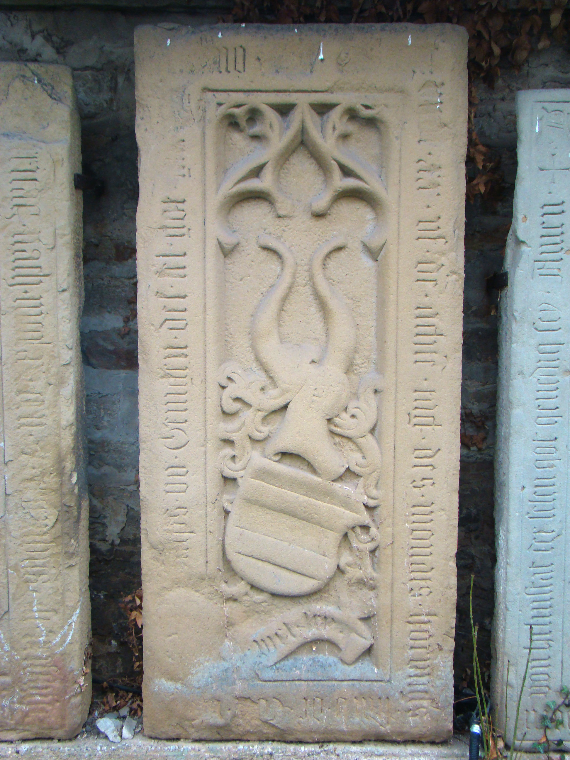 Historische Grabmale beim Unterschloss Gemmingen: Philipp von Gemmingen († 1520)